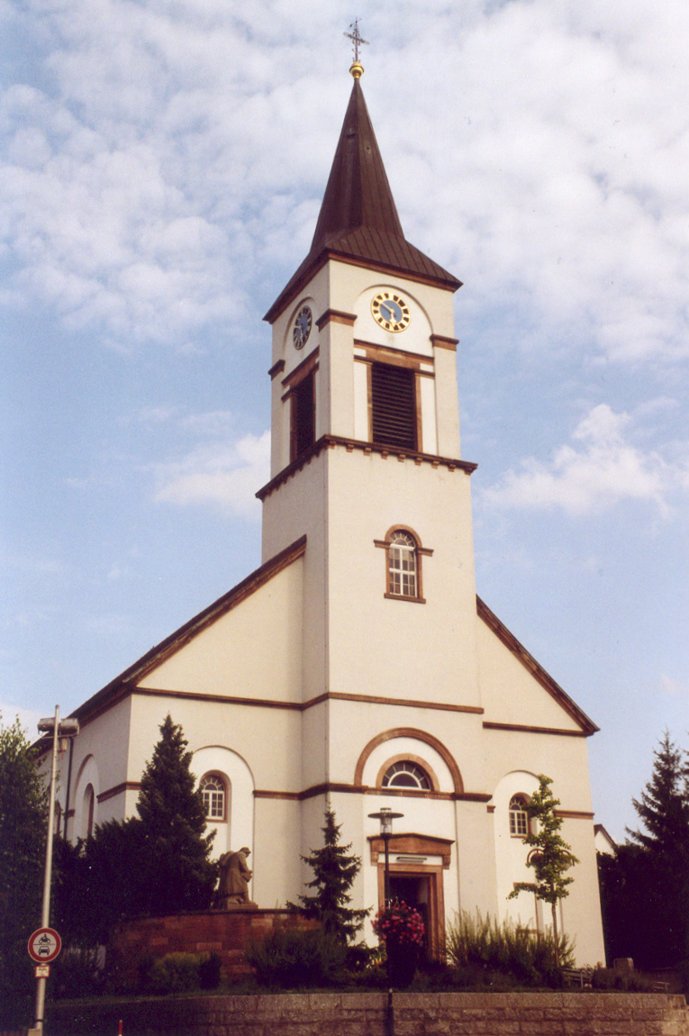 Beschreibung Die Urloffener Kirche im badischen Klassizismus, errichtet 1828-1835 nach Vorgaben von Weinbrenner-Schüler Hans Voss. Ein spätes Beispiel des Weinbrenner-Stiles in Baden.